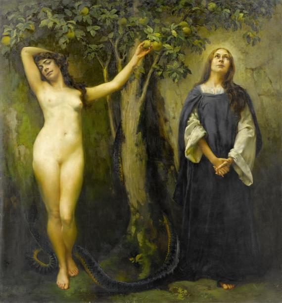 Sinnenlust und Seelenfrieden (Eva und Maria).